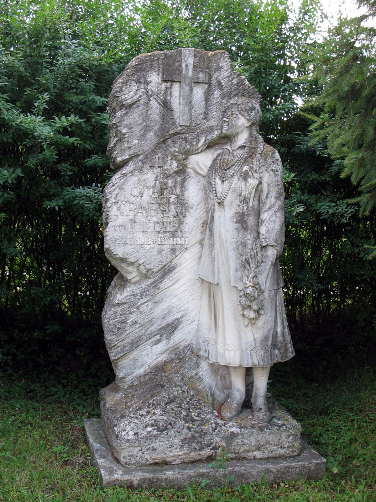 Machnówek (Poland), nagrobek Olgi Krawczuk z 1938 r. dłuta lwowskiego artysty Aleksandra Zagórskiego.